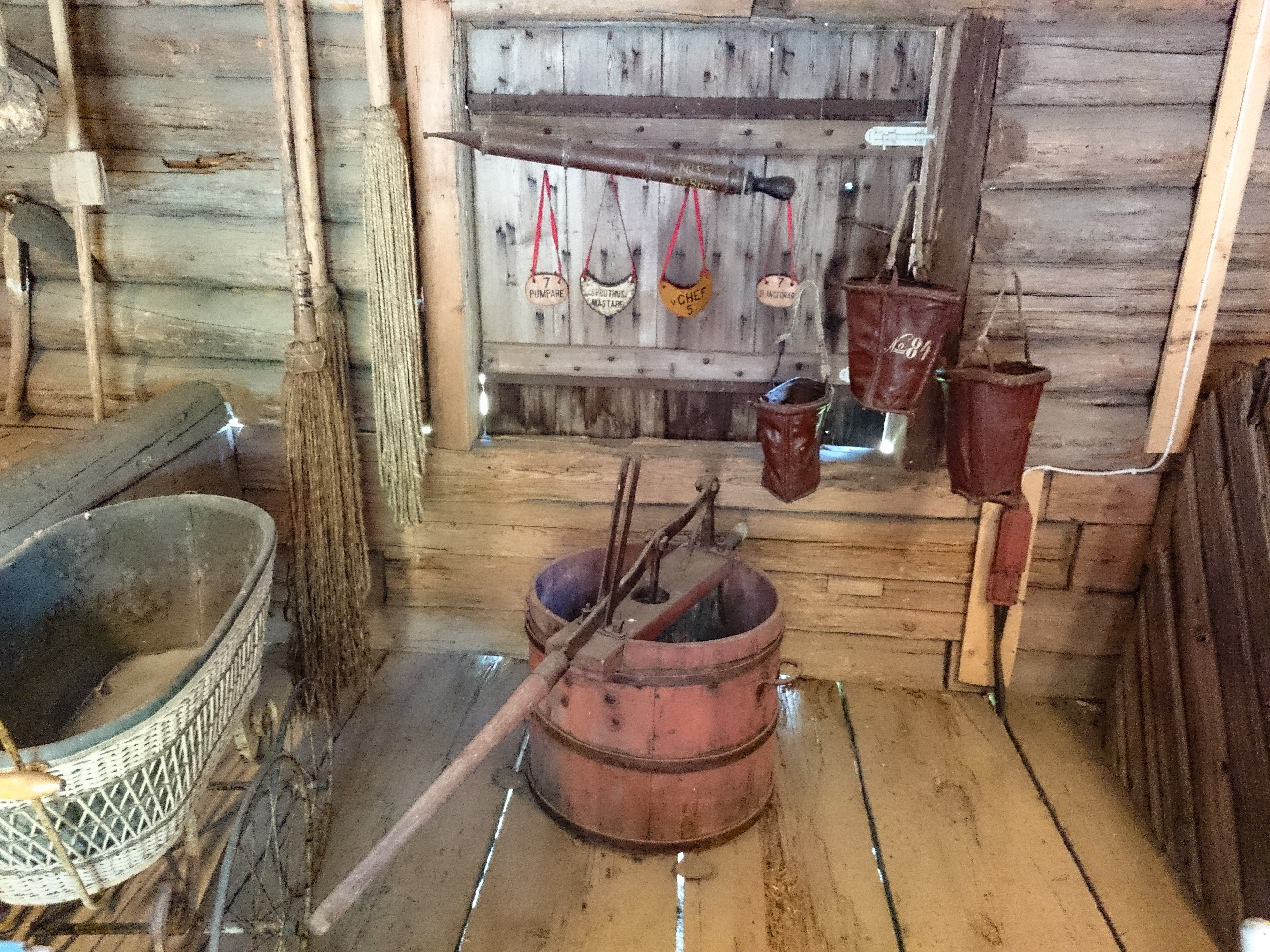 Gammelgårdsdagarna på Hedemora gammelgård, Hedemora, Dalarnas län, Sverige.